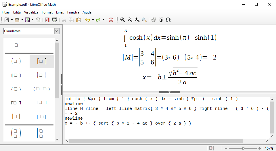 Math de LibreOffice 5.2